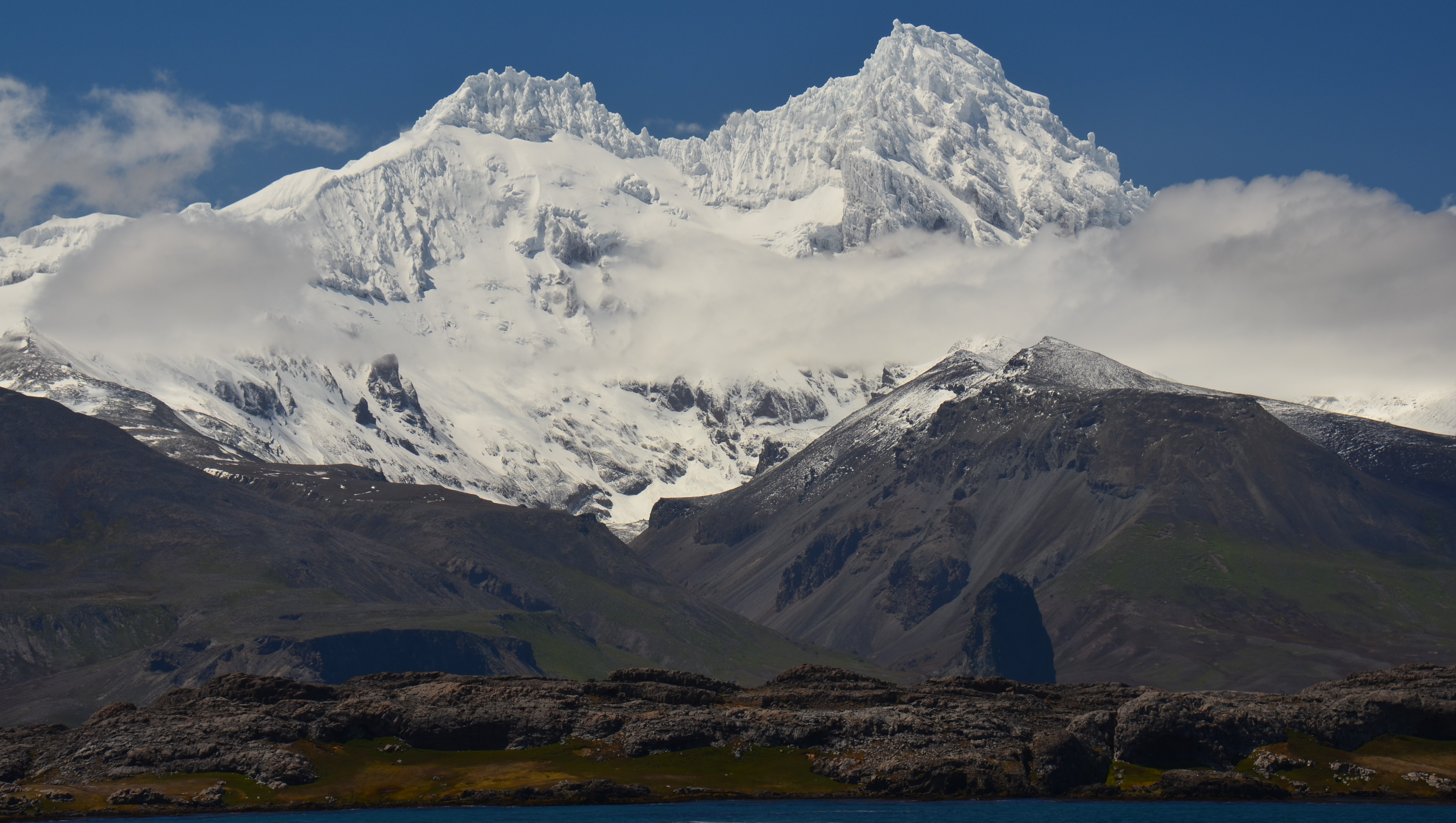 Photo prise depuis le Marion Dufresne à l'occasion de l'OP4 - 2013.